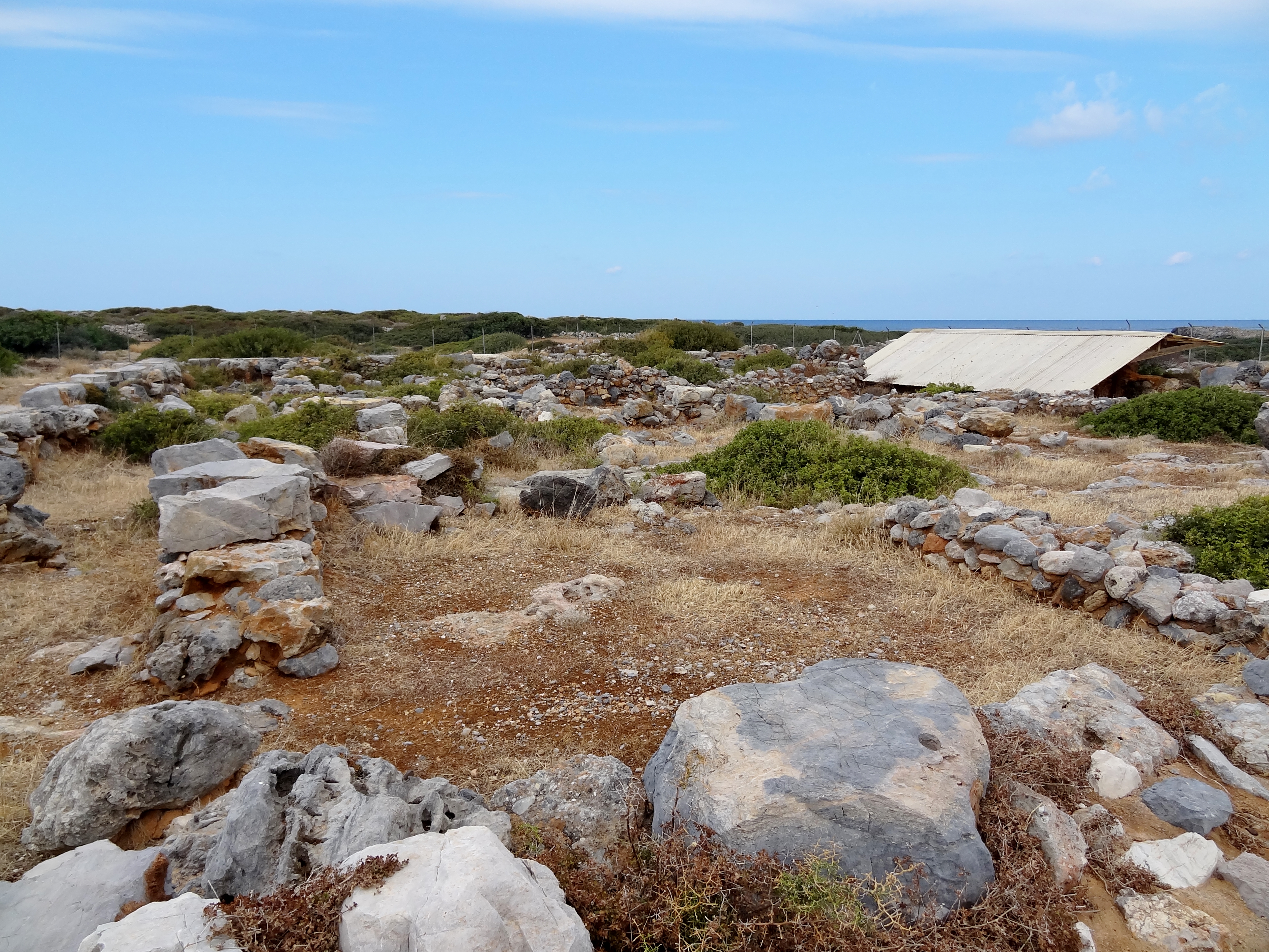 Ausgrabungsstätte von Chrysolakkos (Χρυσόλακκος), Gemeinde Chersonisos, Kreta, Griechenland